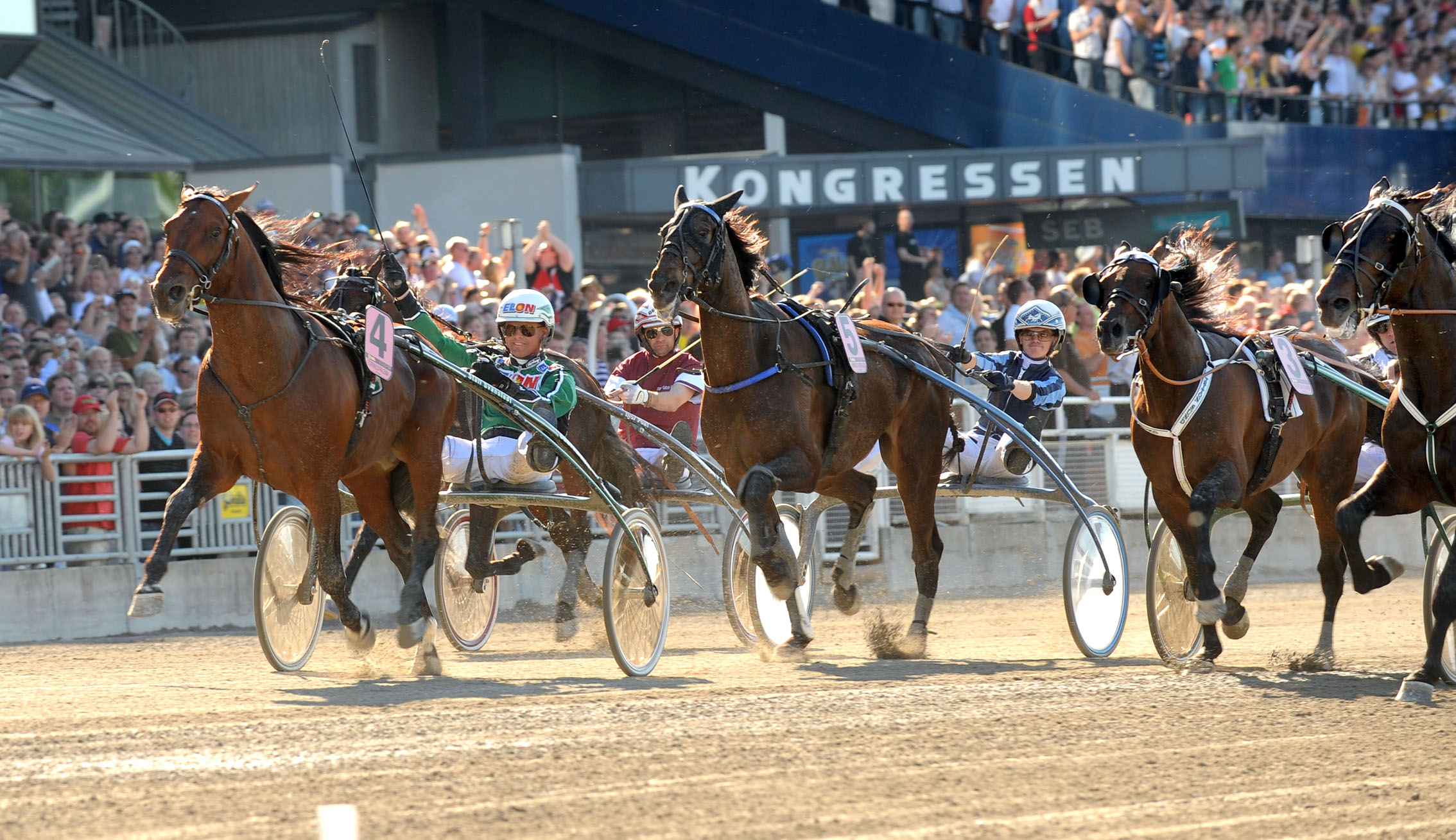 Kusken Åke Svanstedt och travaren Torvald Palema (4) vinner Elitloppet 2009 på Solvalla.